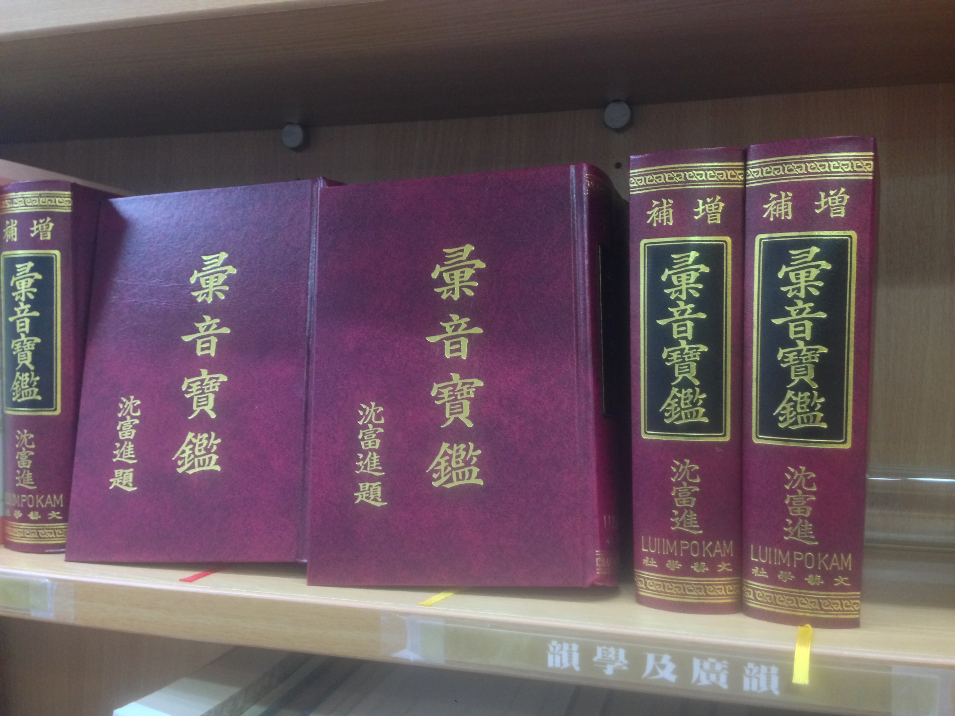 《增補彙音寶鑑》，沈富進著，文藝學社出版，攝於三民書局復北門市。